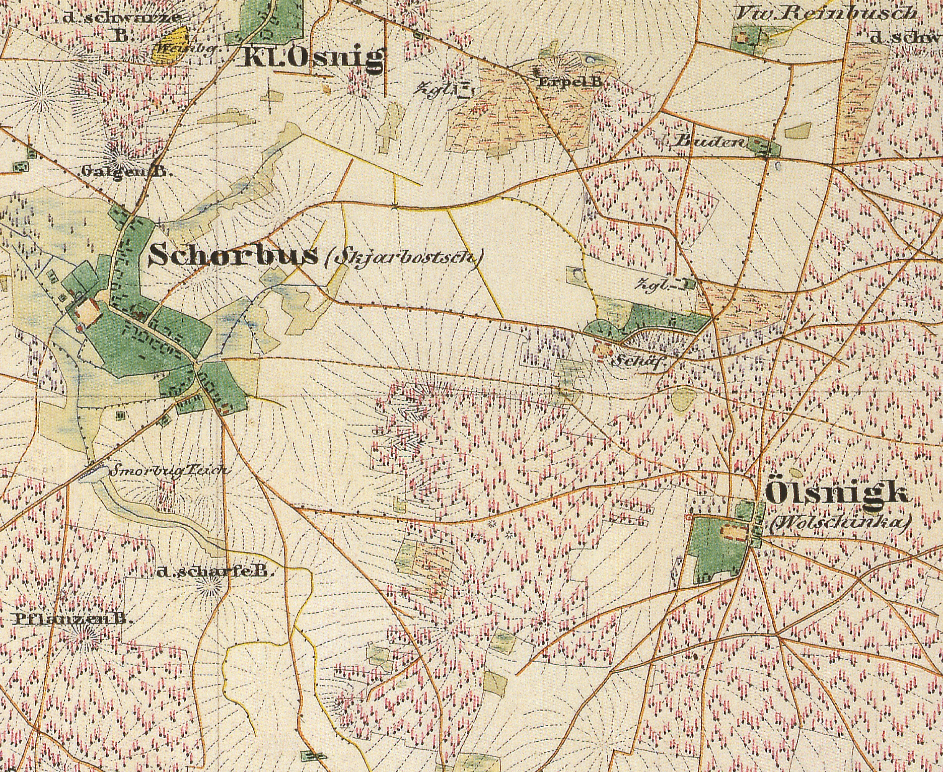 Schorbus, Ortsteil der Stadt Drebkau, Landkreis Spree-Neiße, Brandenburg, Ausschnitt aus dem Urmesstischblatt 4351 Drebkau von 1846 (sorbische Ortsnamen in Klammern) Hornjoserbsce: Hamtska karta z lěta 1846 ze serbskimi mjenami w spinkach